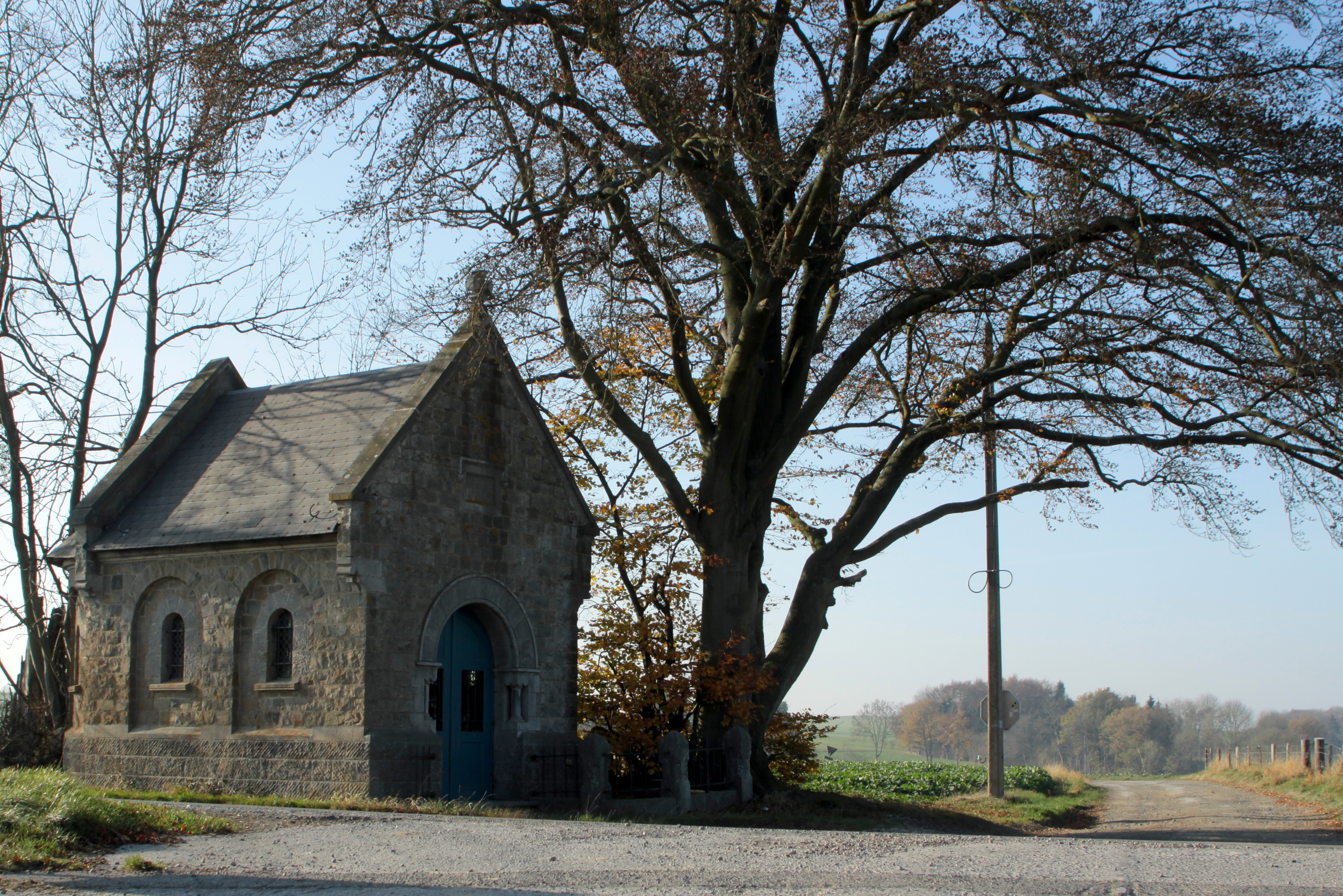 D'Kapell Notre-Dame de la Grâce zu Hulsonniaux